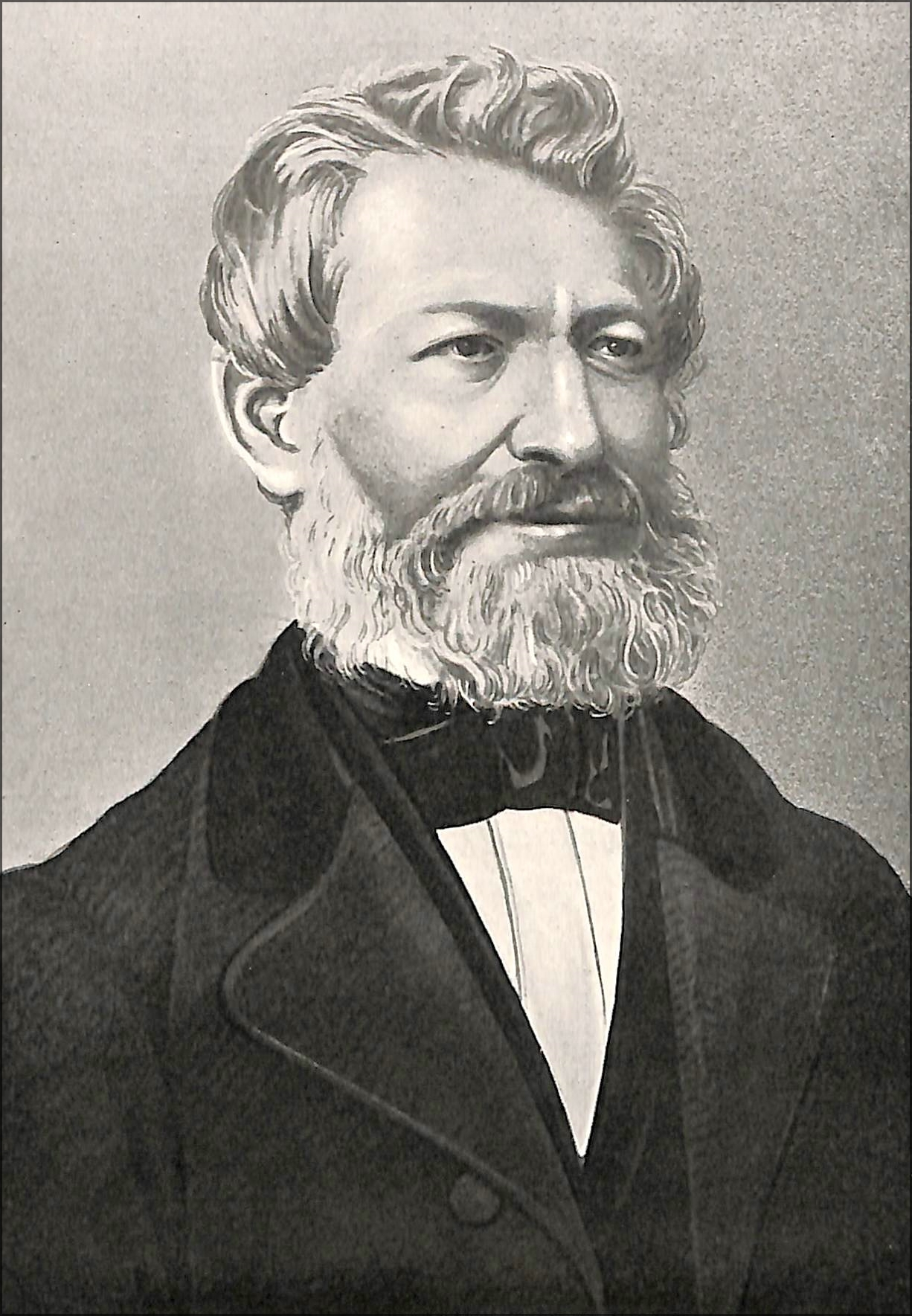 Portrait des Schweinfurter Bürgers Philipp Moriz Fischer (1812-1890)